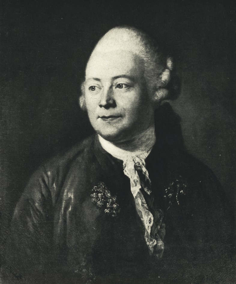 Porträt des Dichters Christian August Clodius